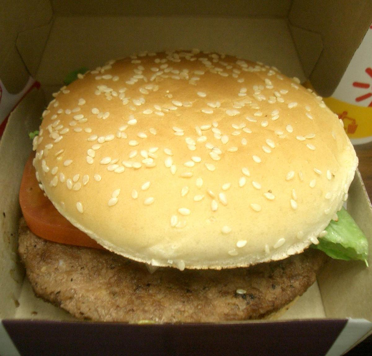 2010/03/02 lunch